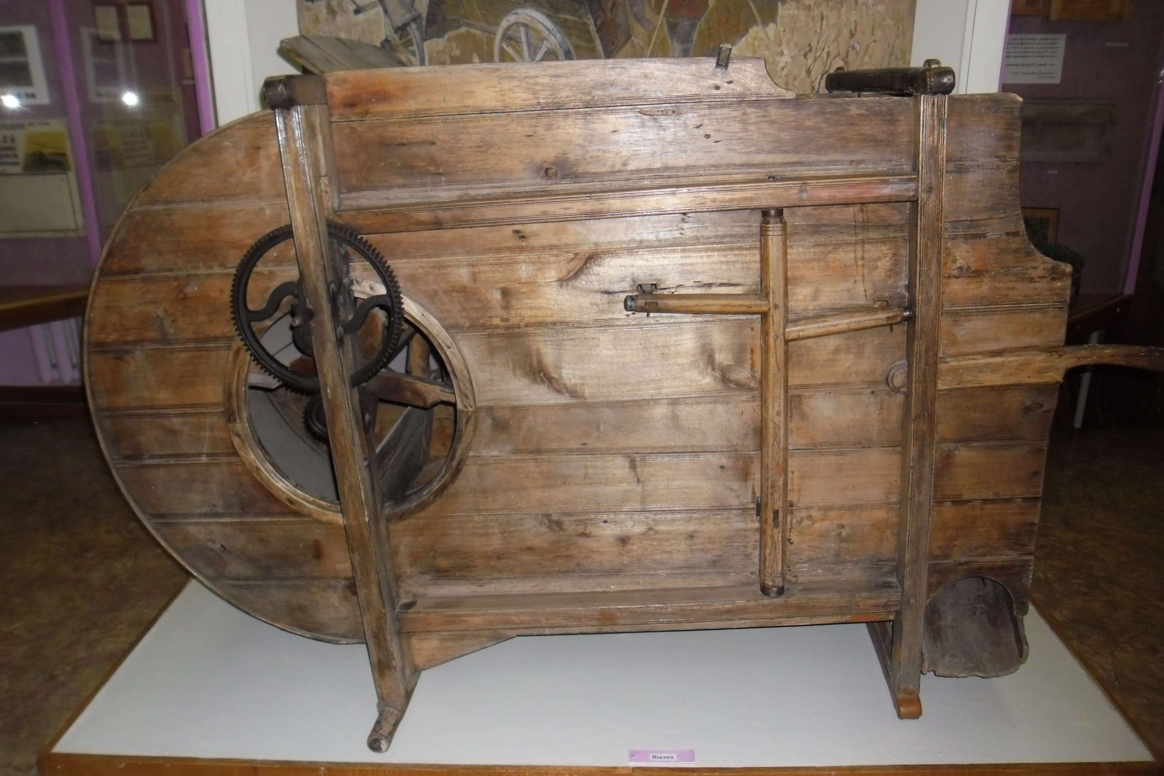 Фото